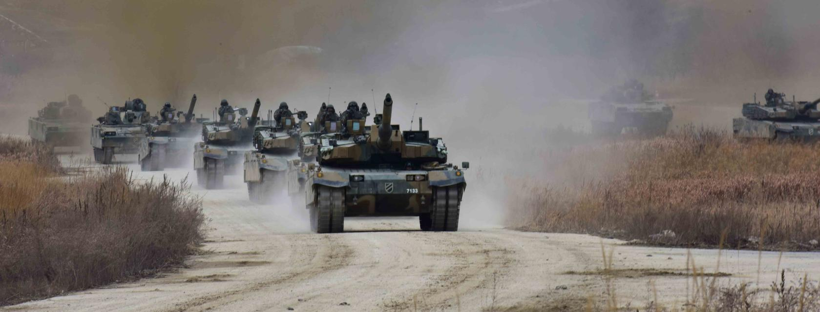 11사단 중대전투훈련 1